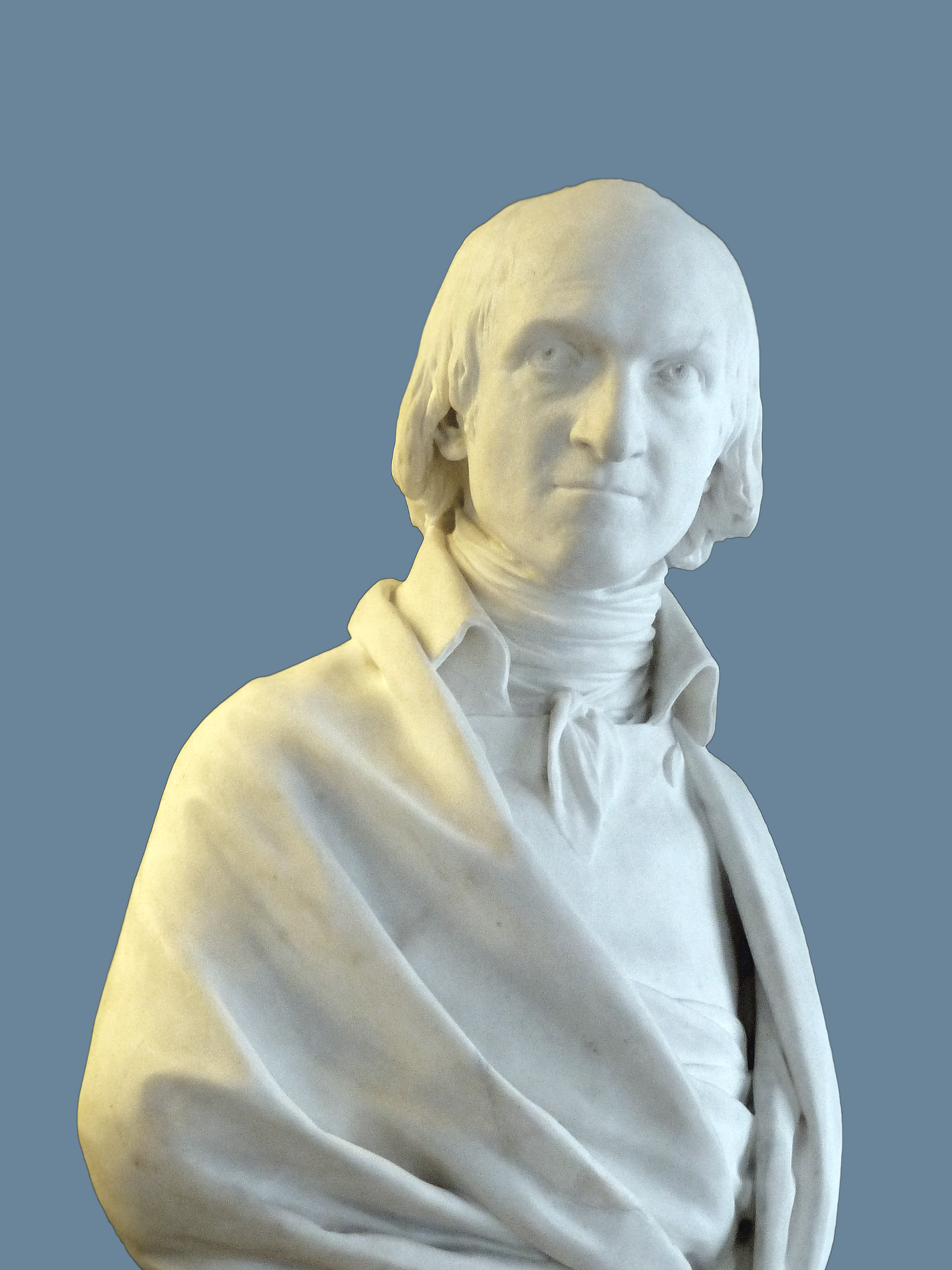 Jean-Antoine Houdon. Buste d'Adrien Duquesnoy. Musée Lorrain (dépôt du Musée national du château de Versailles)